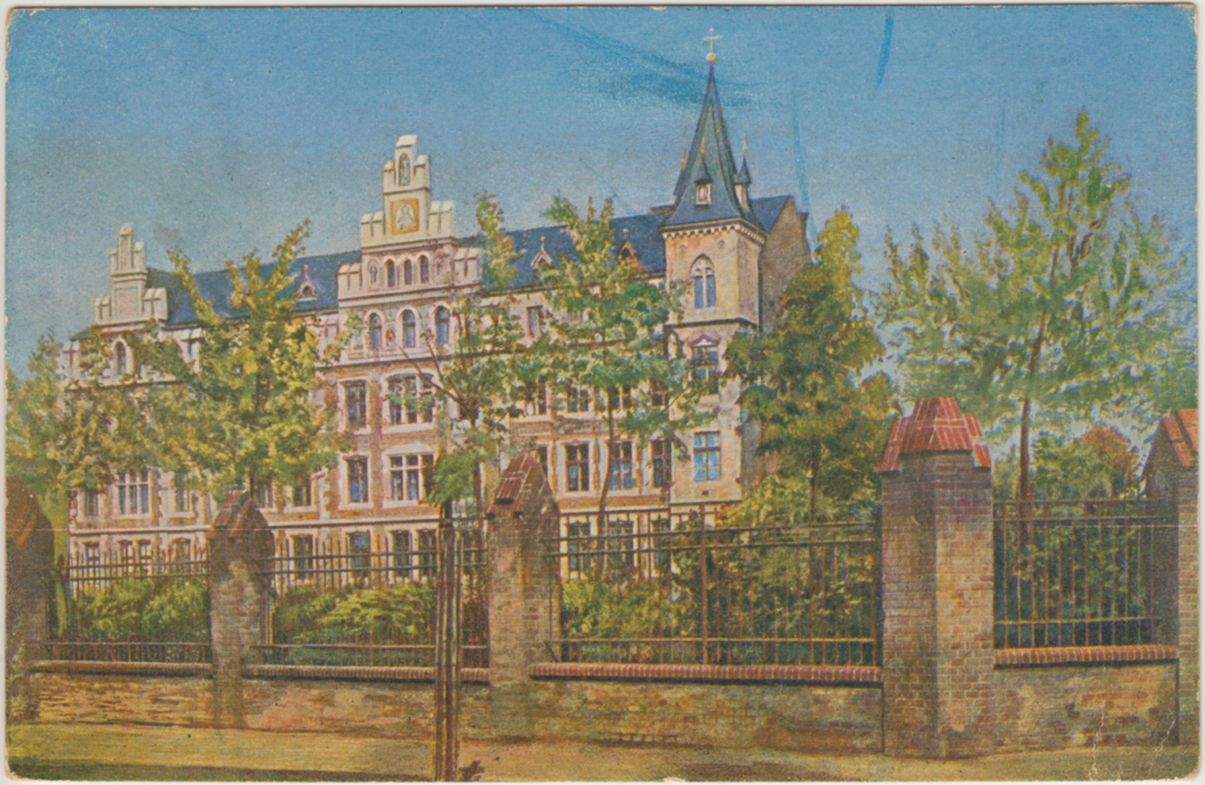 Knížecí Arcibiskupské gymnasium v Praze-Bubenči 299. Architekt František Mikš.